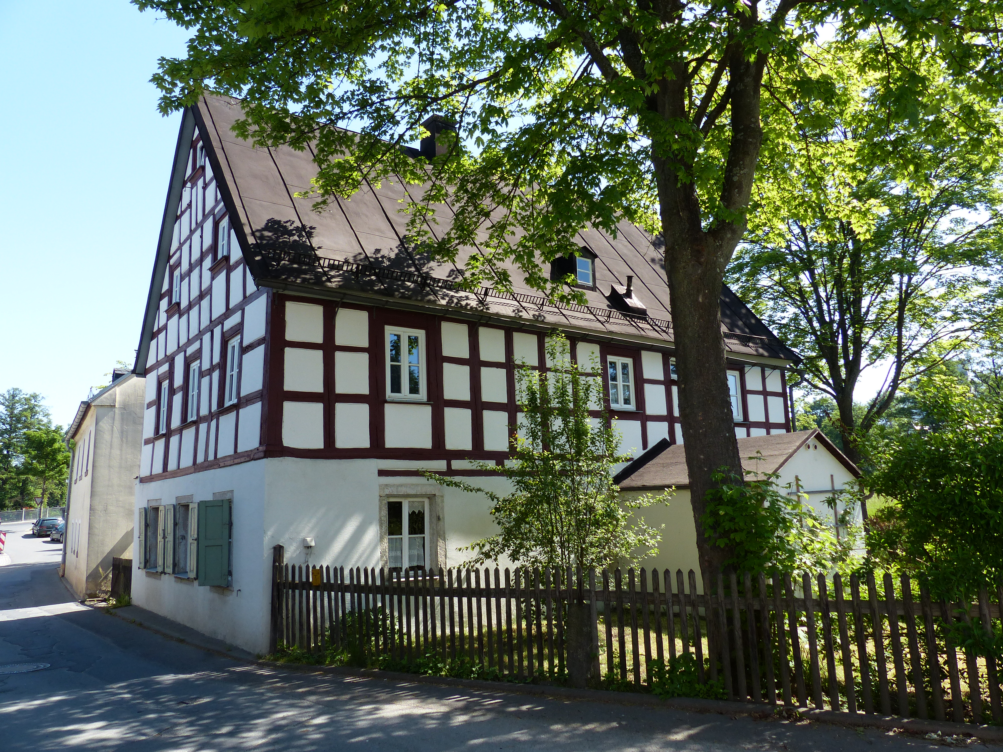 Baudenkmal der Stadt Schwarzenbach an der Saale